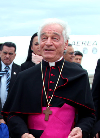 Roma (Italia), 27 de abril de 2015. El Canciller Ricardo Patiño recibió al Presidente Rafael Correa en el aeropuerto de Roma, quienes cumpliran una visita Vaticano. Foto: Luis Astudillo C. / Cancillería